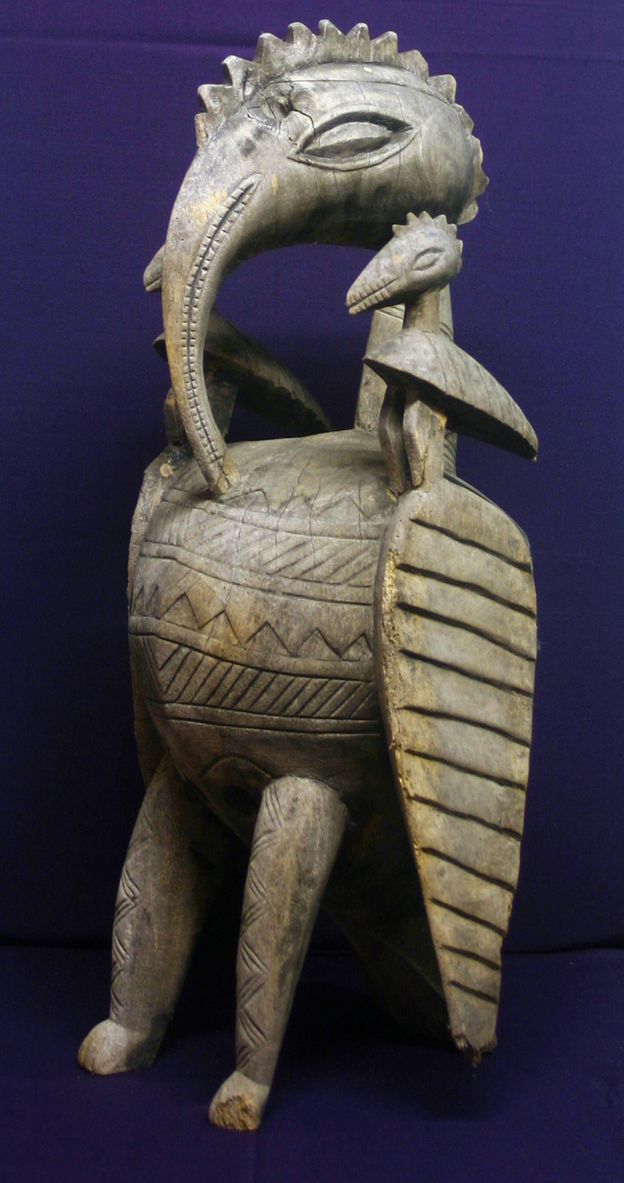 Helmmaske, Vogelkopfmaske, Senoufo aus der Sammlung des Capitaine Baud Helmet mask Cote d'Ivoire about 1900